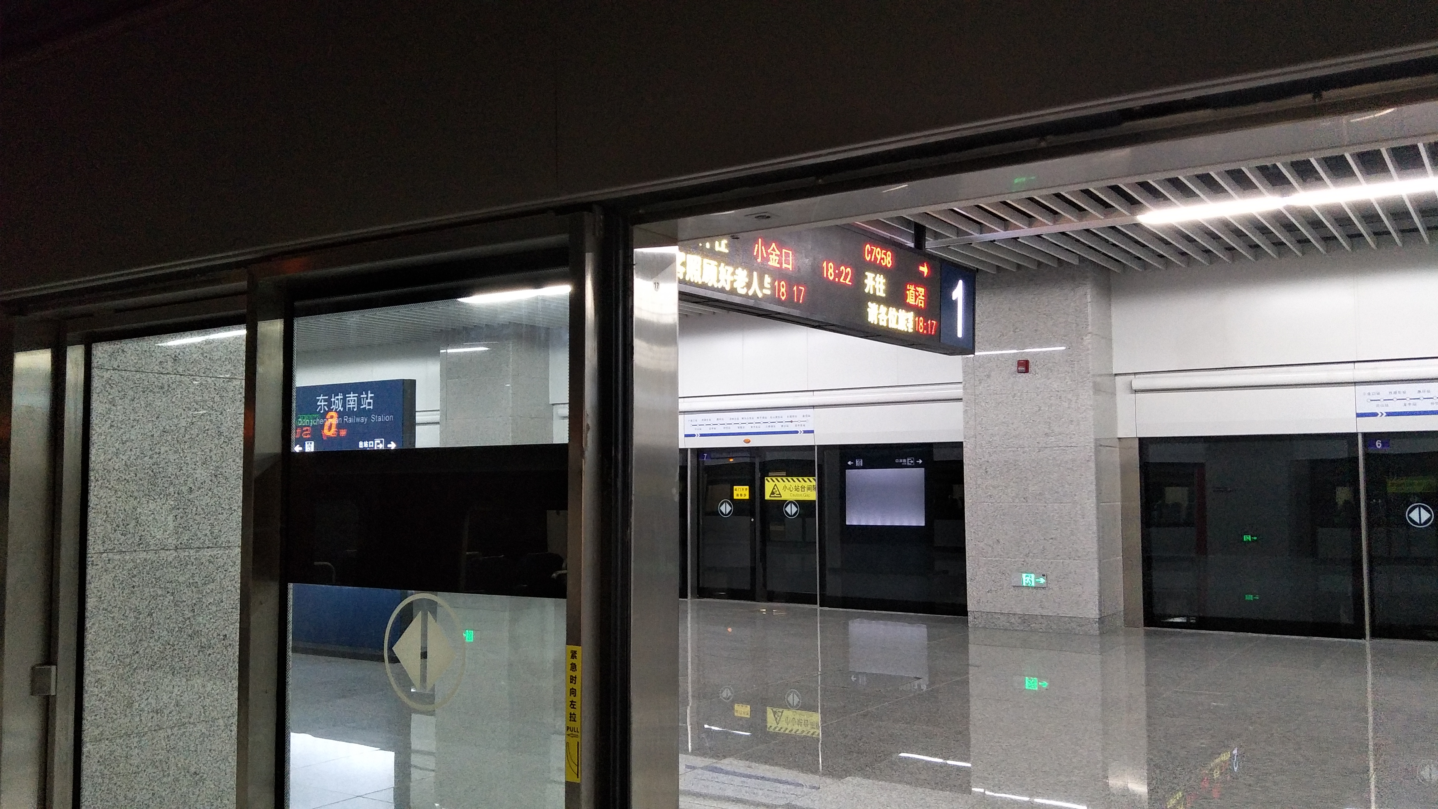 东城南站月台